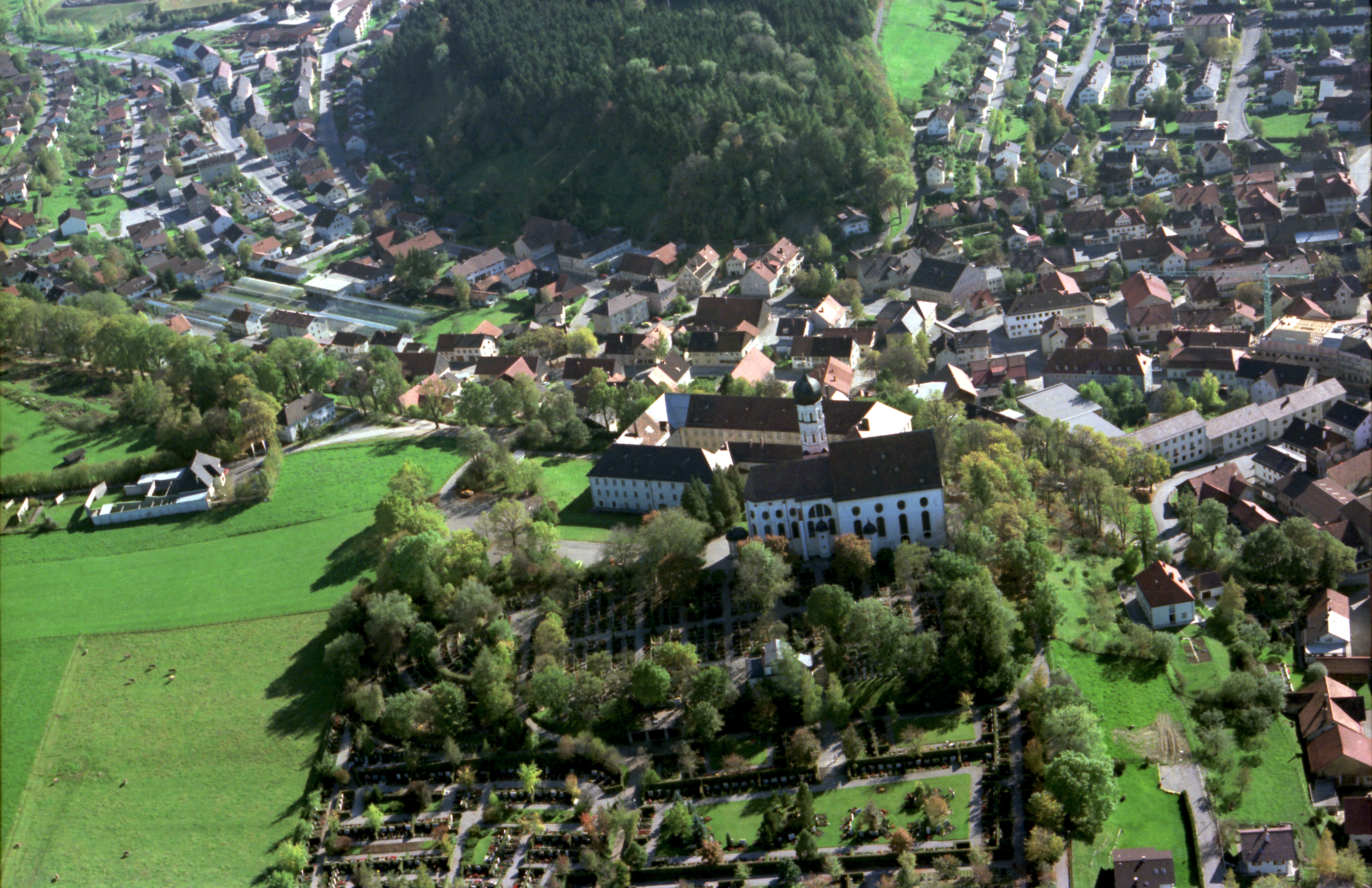 Luftaufnahme von Marktoberdorf. In der Bildmitte die Stadtpfarrkirche St. Martin. Aufnahmedatum 1976